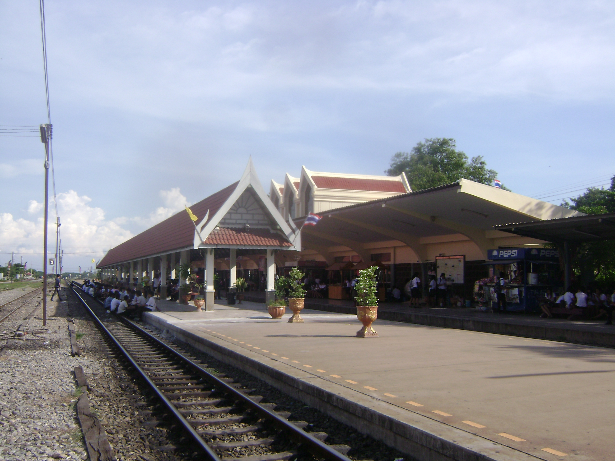 บรรยากาศบริเวณสถานีรถไฟลพบุรี